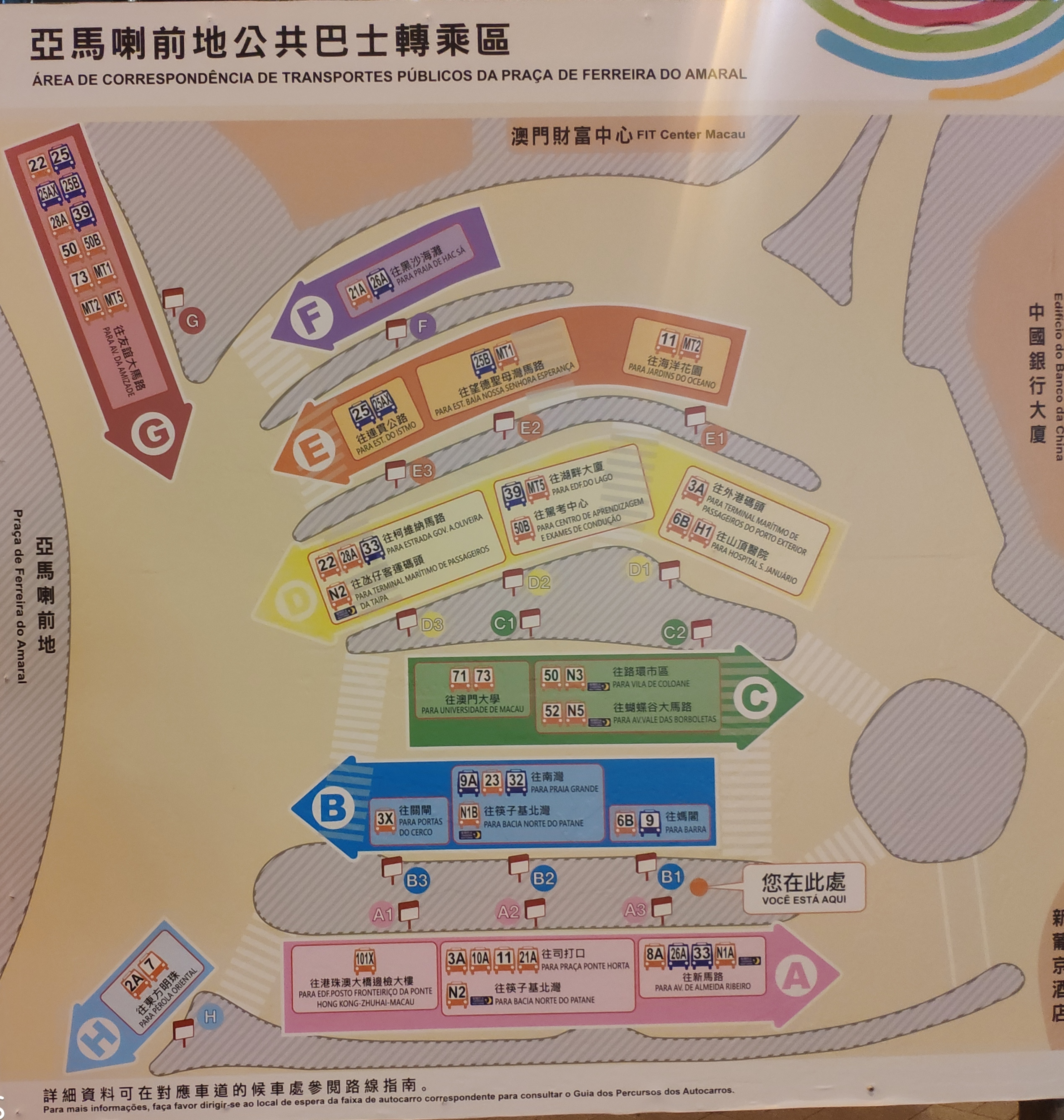 亞馬喇前地巴士站